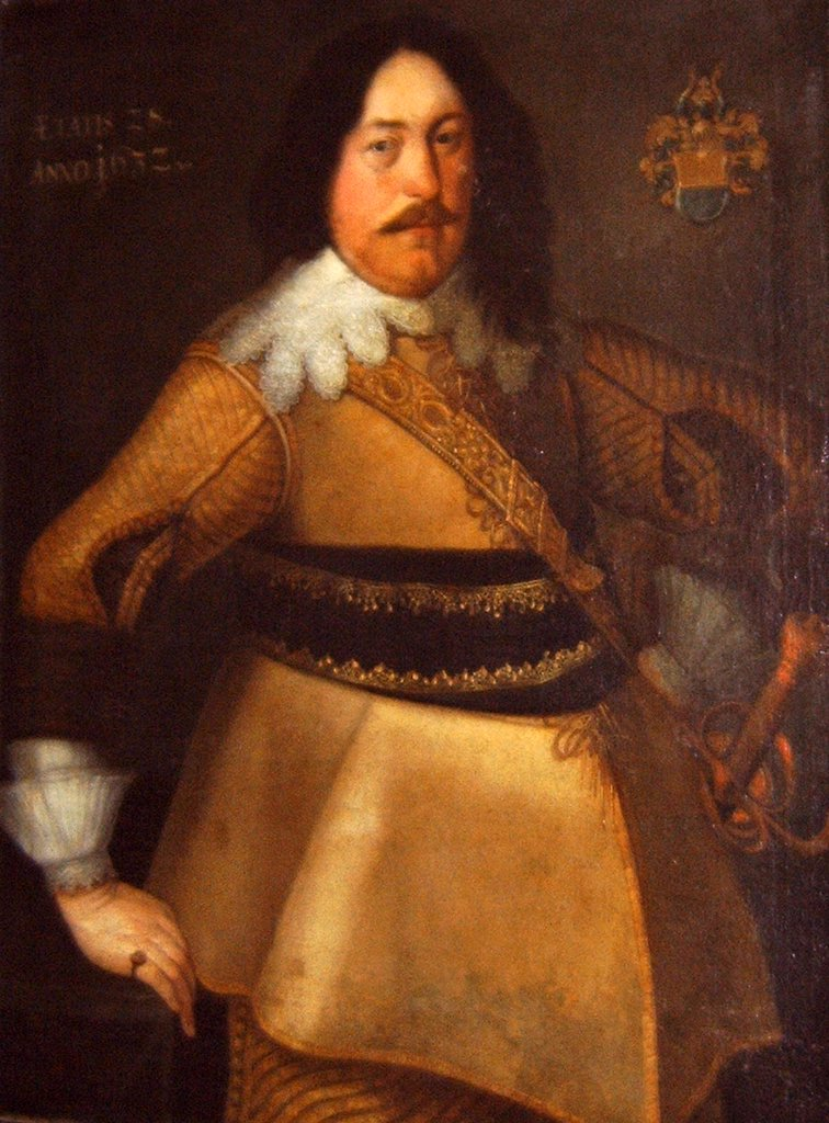 Freiherr Wolf Conrad Greck III. von Kochendorf im Alter von 28 Jahren. Gemälde 1632. Eigentümer: Dajo von Gemmingen-Hornberg, Archiv Burg Hornberg